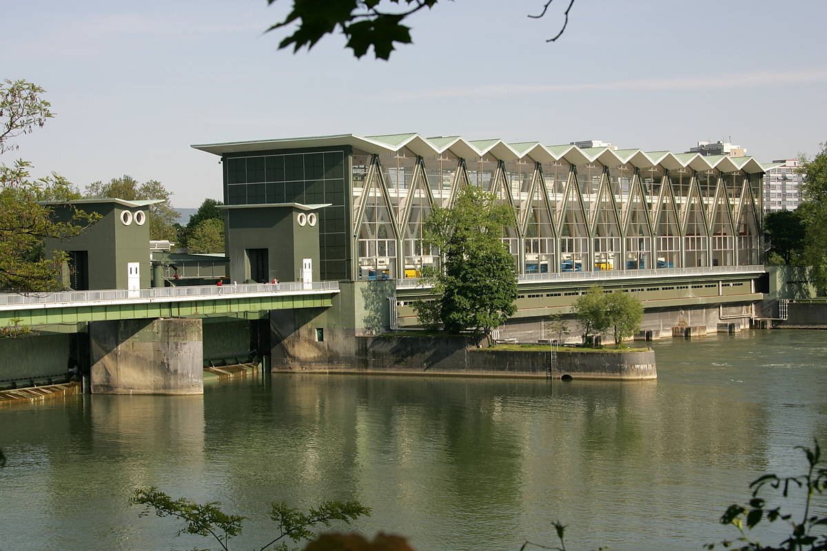 Flusskraftwerk am Rhein in Birsfelden, Kanton Basel-Landschaft, Schweiz